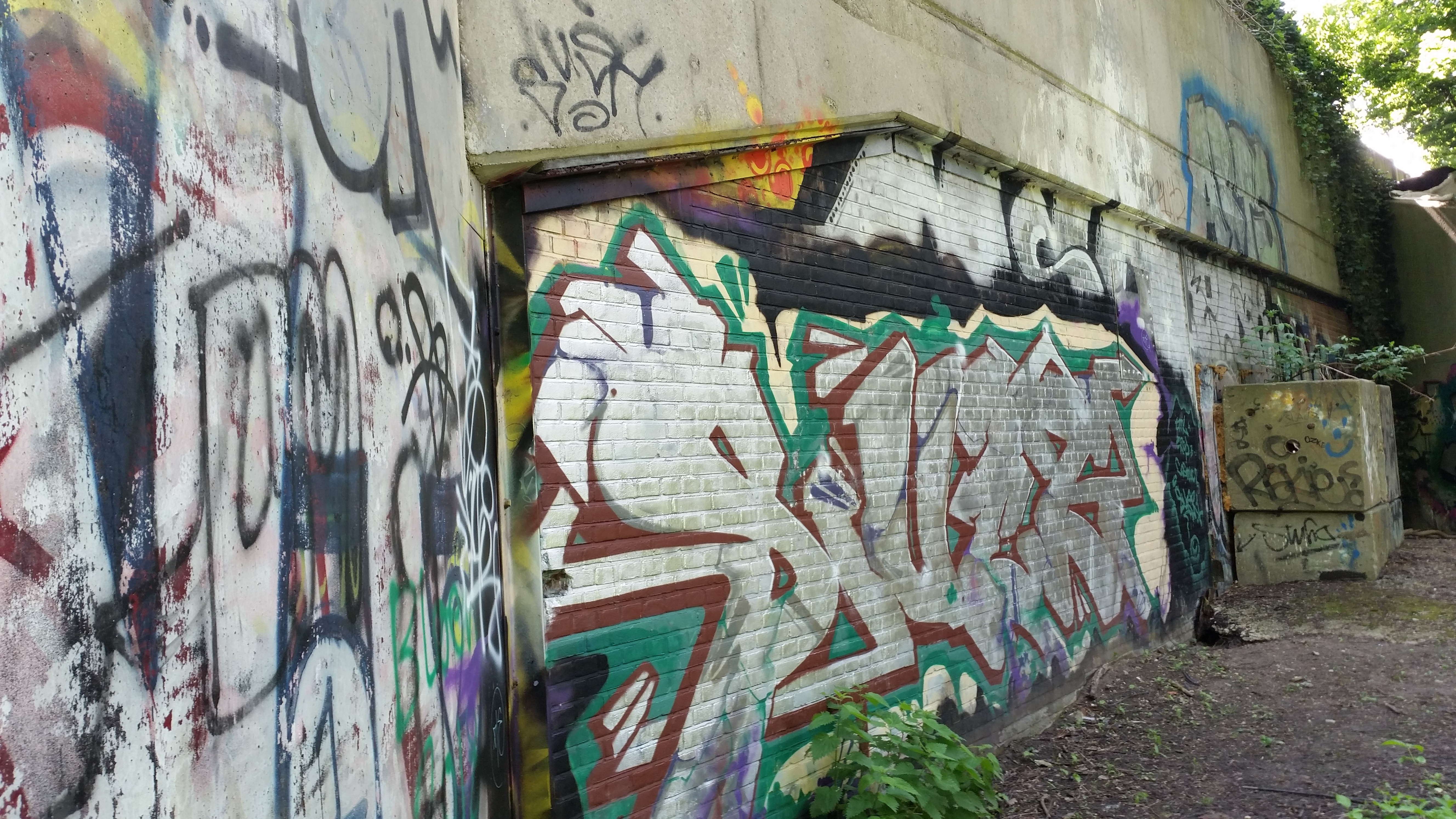 Brug 228P (in Amsterdam), dichtgemetseld